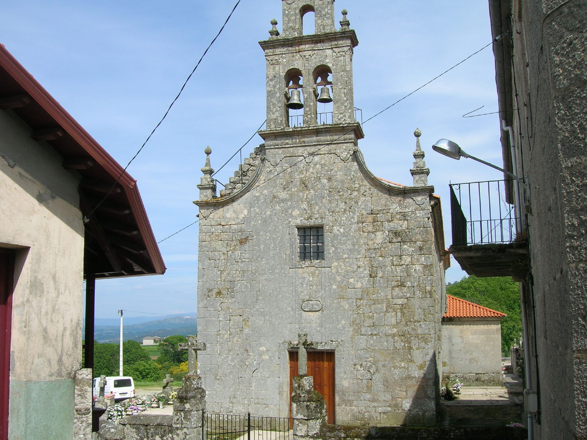 En la fachada principal de la iglesia, se conservan piezas de una ventana con arco de herradura, encasilladas con los sillares de la posterior reconstrucción.